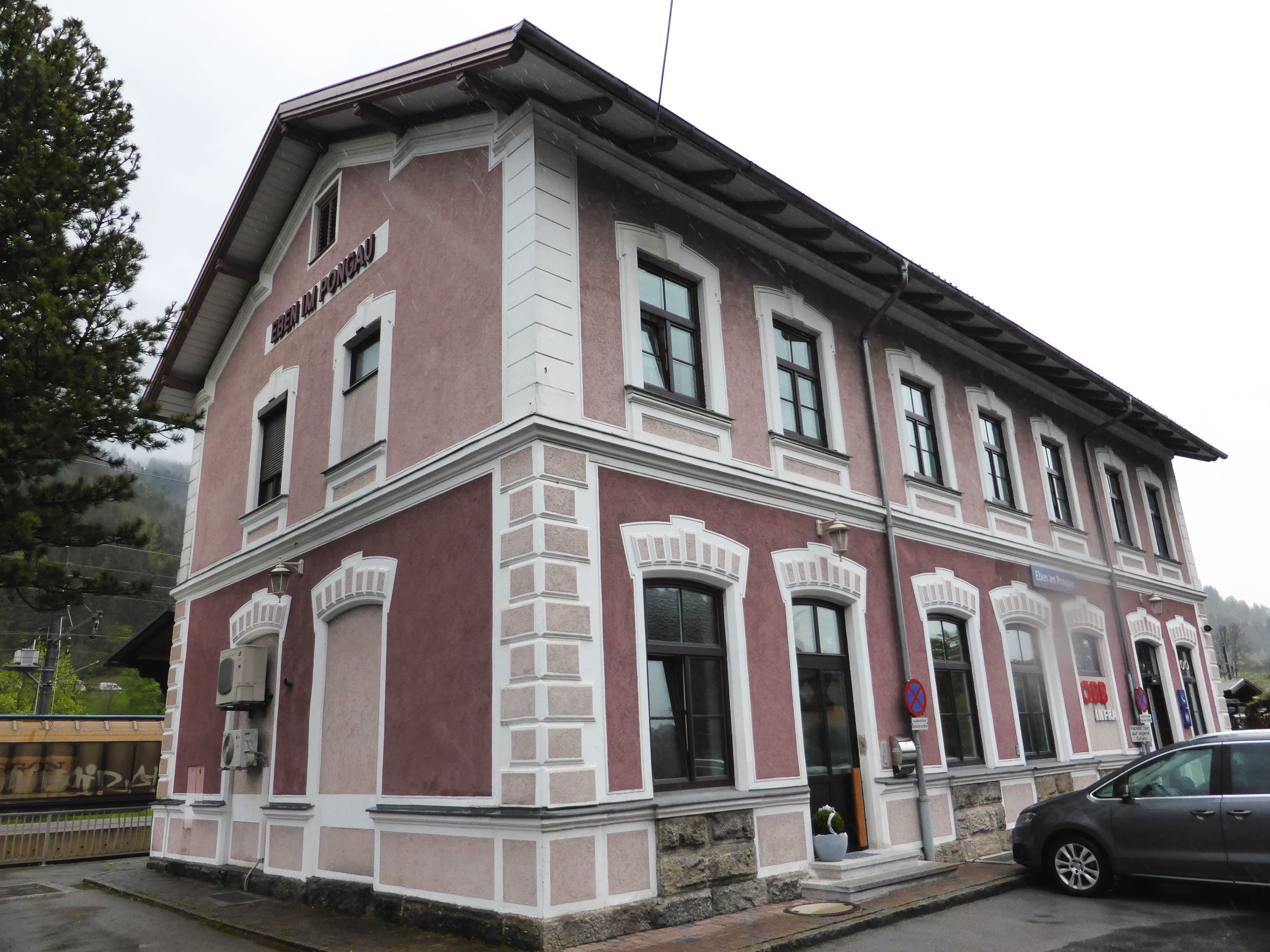 Aufnahmsgebäude